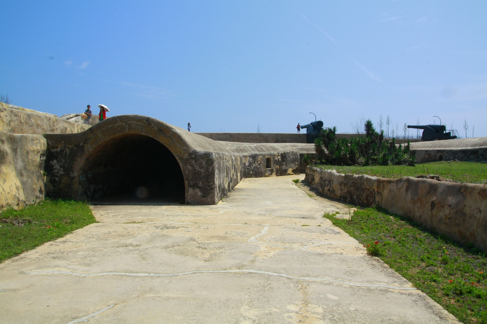 西嶼西臺